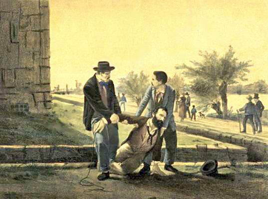 Paolo Calvi, Fuga di Felice Orsini dalla fortezza di Mantova, ridotto, ritoccato, litografia